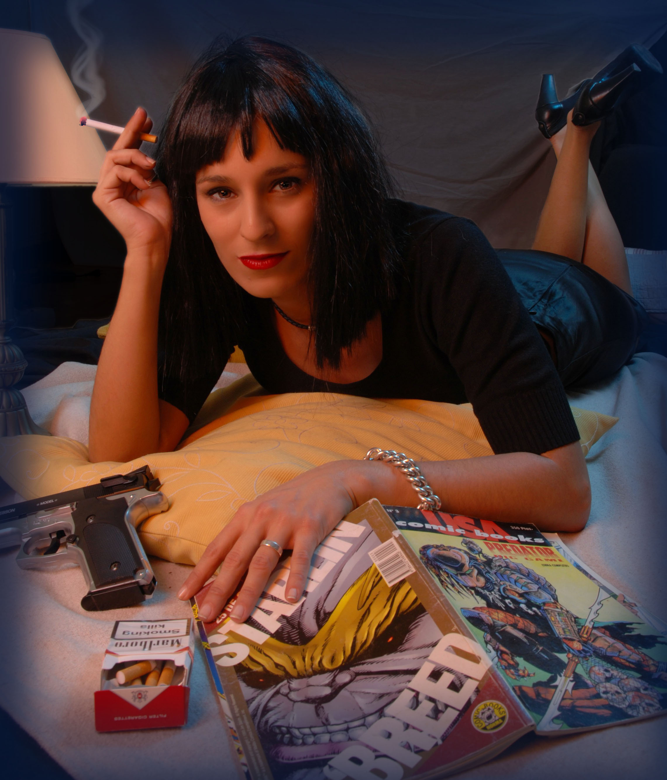 Parodie de l'affiche du film Pulp Fiction.